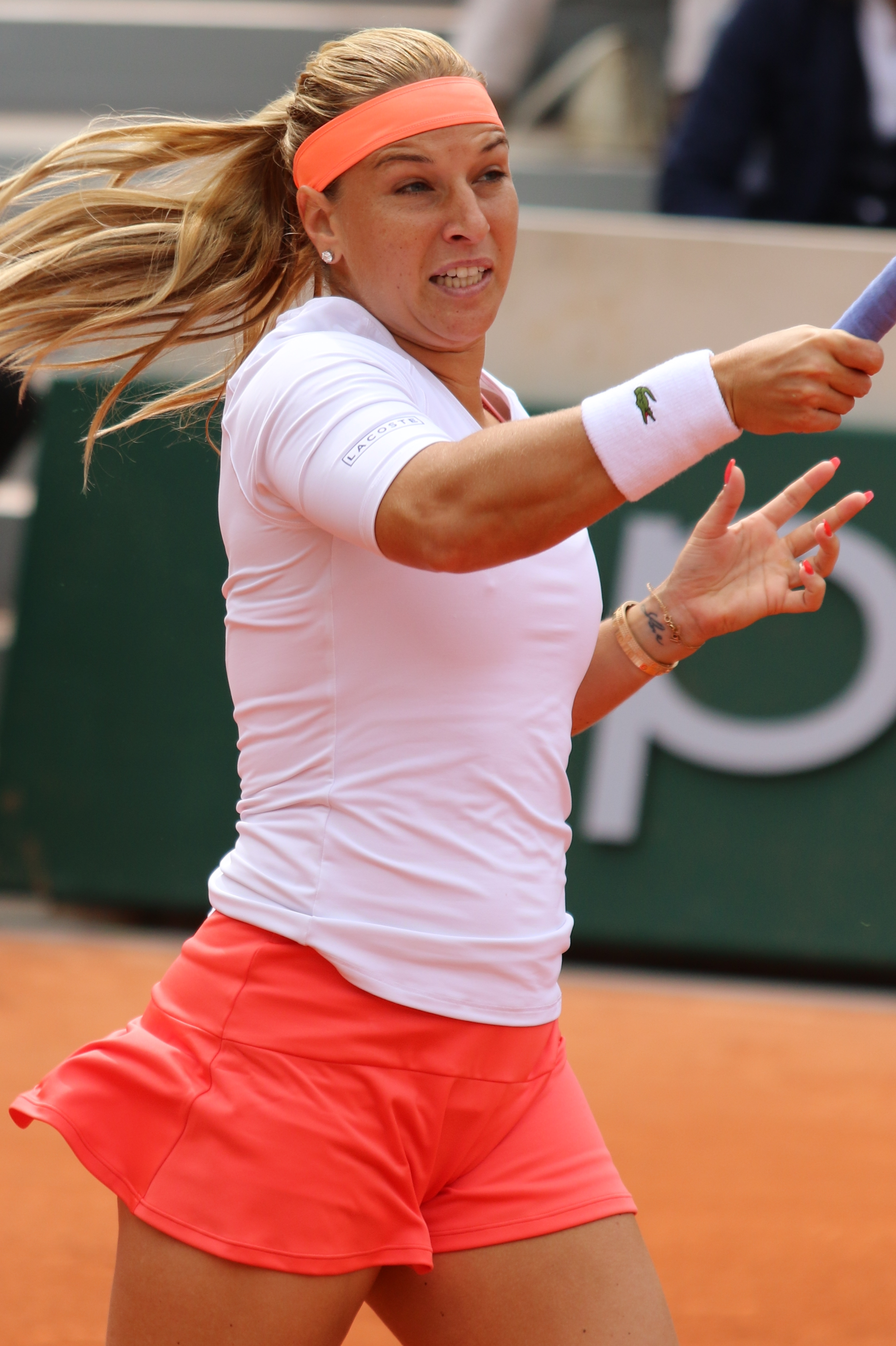 Cibulkova RG19 (5)